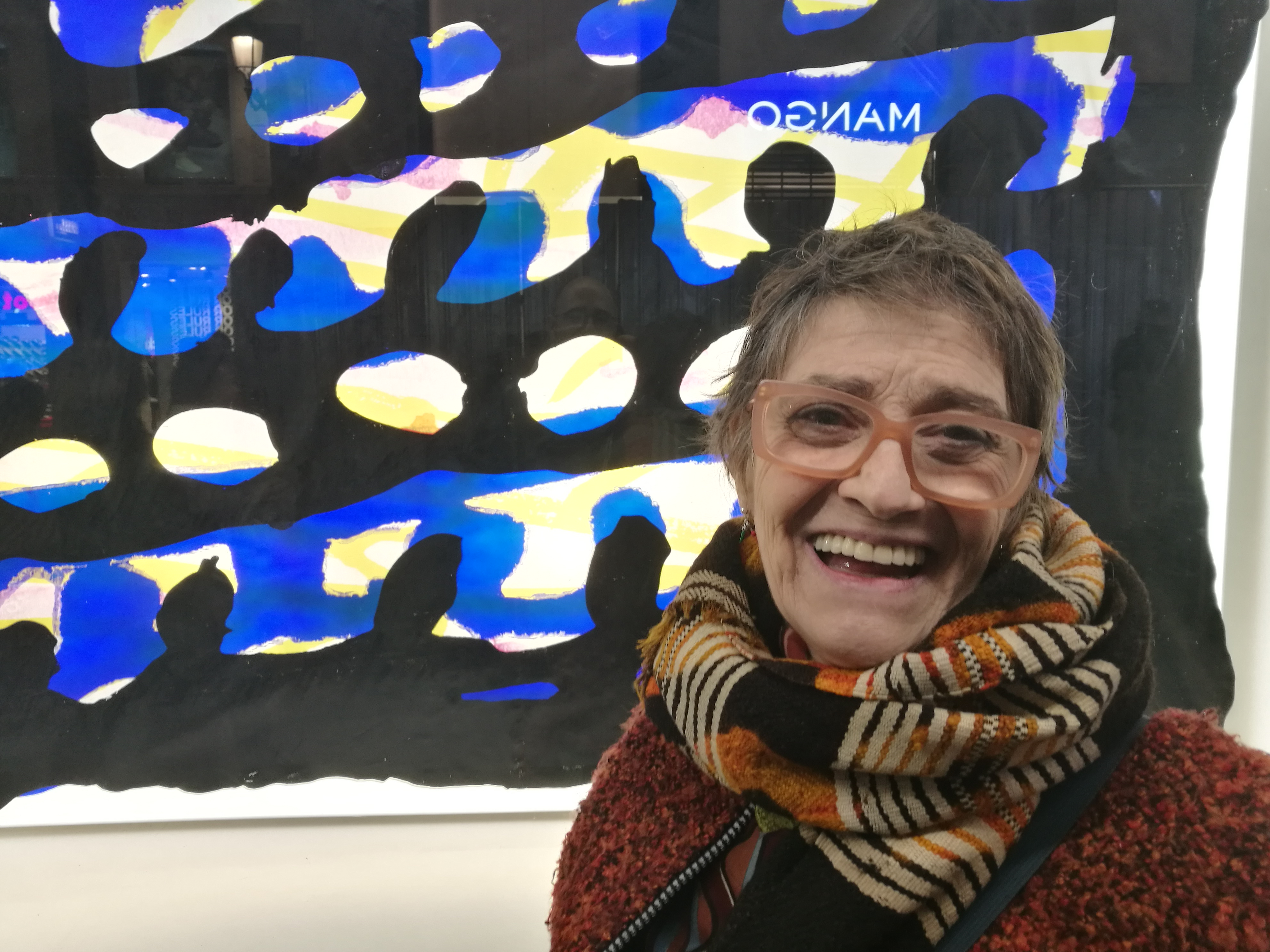 Marta Cárdenas el 19 de febrero de 2018 el día de la inauguración de su obra Mujeres en acción, situada en un escaparate de El Corte Inglés de la calle Preciados de Madrid. Formaba parte de la exposición de instalaciones Pintura-Painting? (en la que también participaron Alfonso Albacete, Irma Álvarez Laviada, Menchu Lamas, Carlos León y Juan Ugalde, comisariada por Alfonso de la Torre en coincidencia con la feria de arte contemporáneo ARCO.